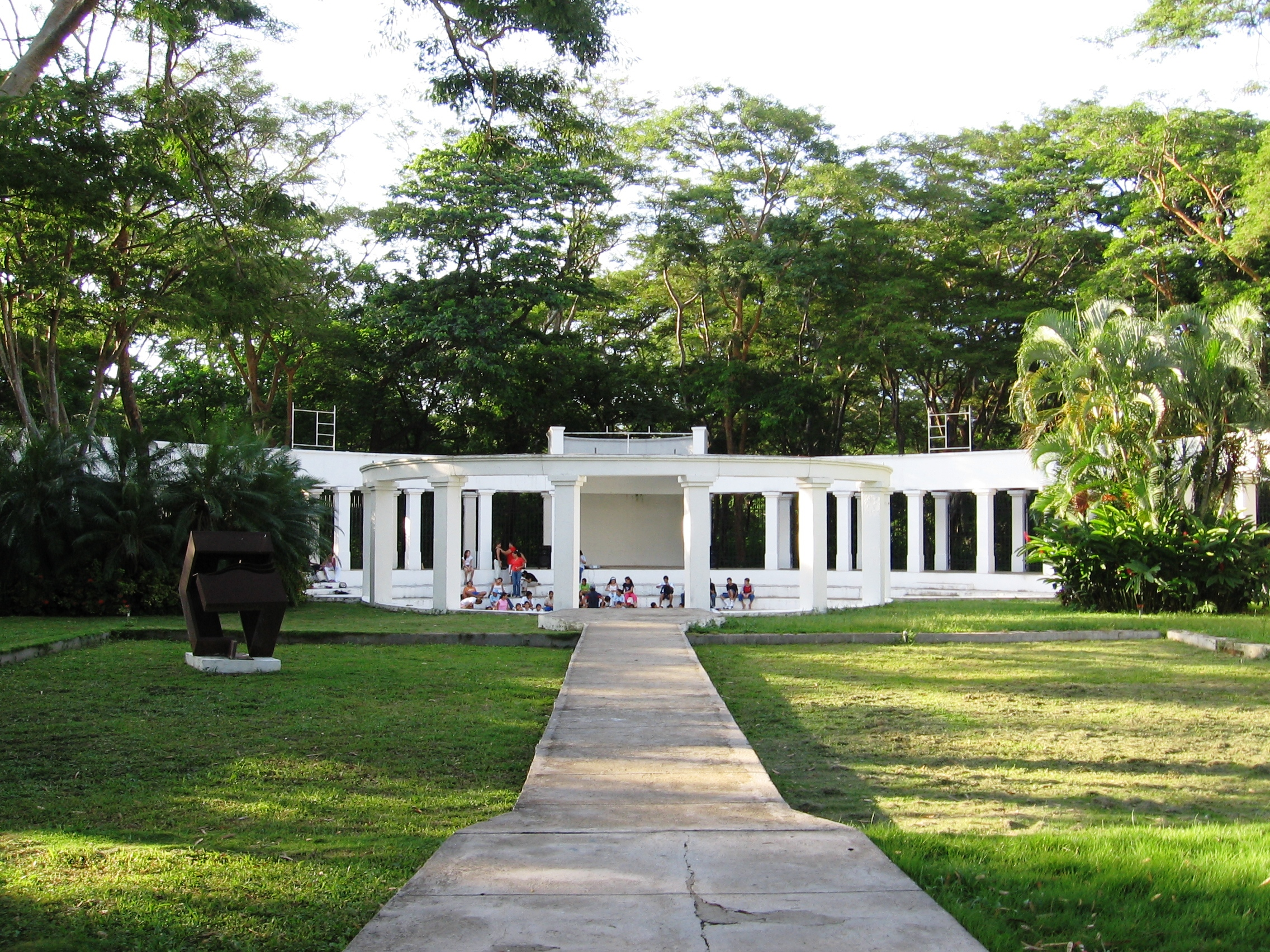 Quinta de San Pedro Alejandrino. Santa Marta, Colombia.